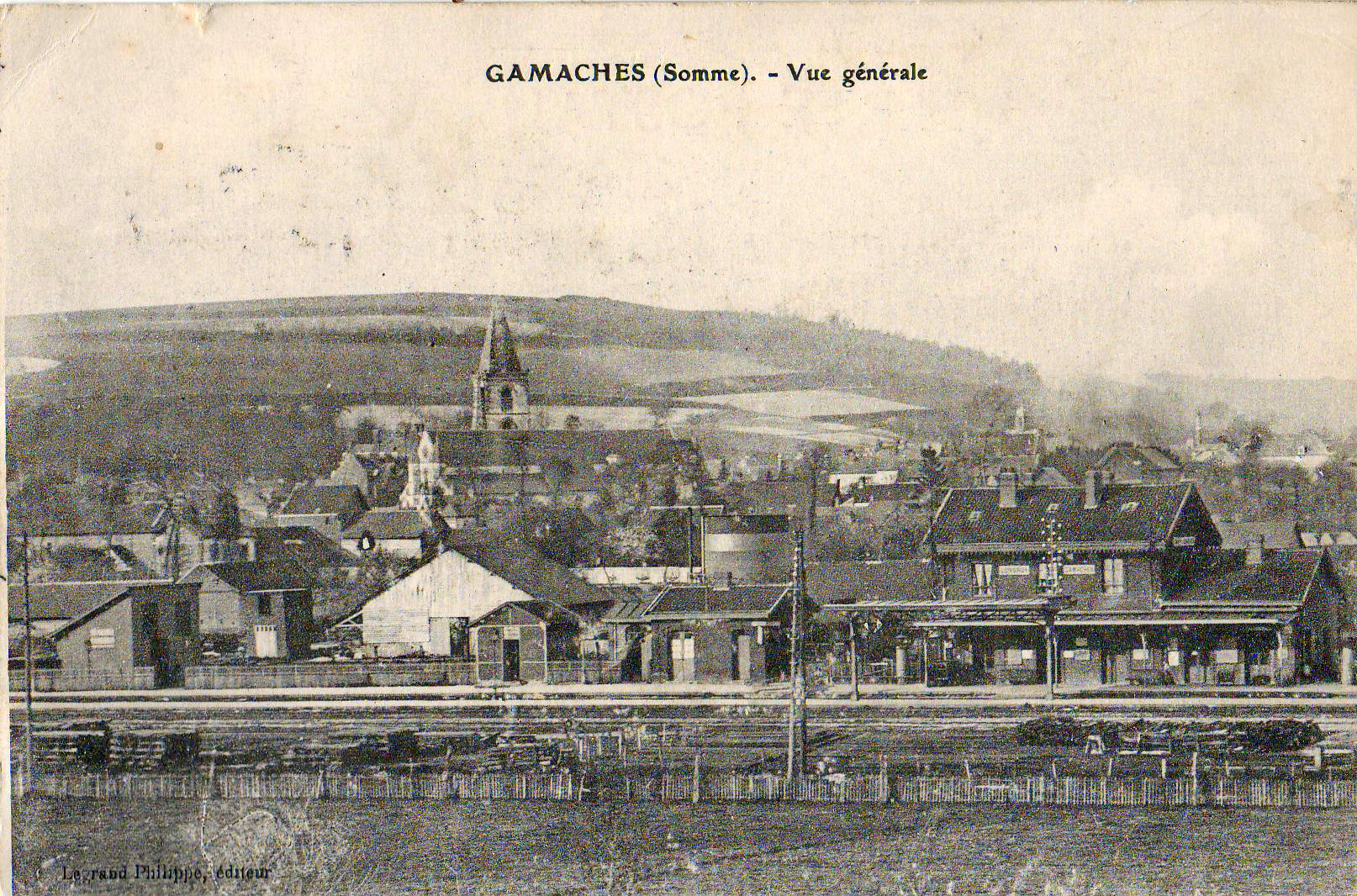 Carte postale ancienne éditée par Legrand Philippe : GAMACHES - Vue générale